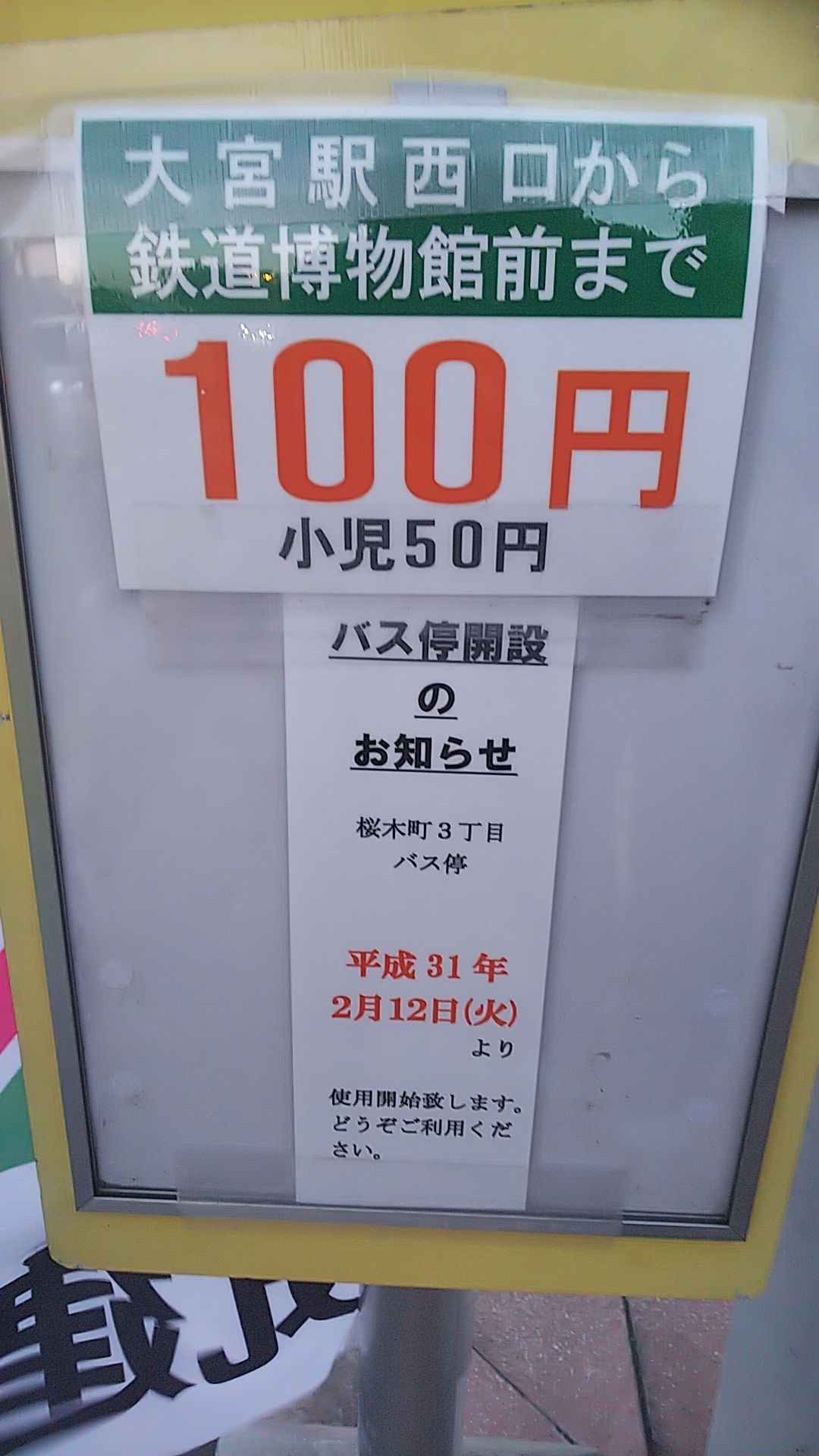 バス停開設のお知らせと一部区間運賃